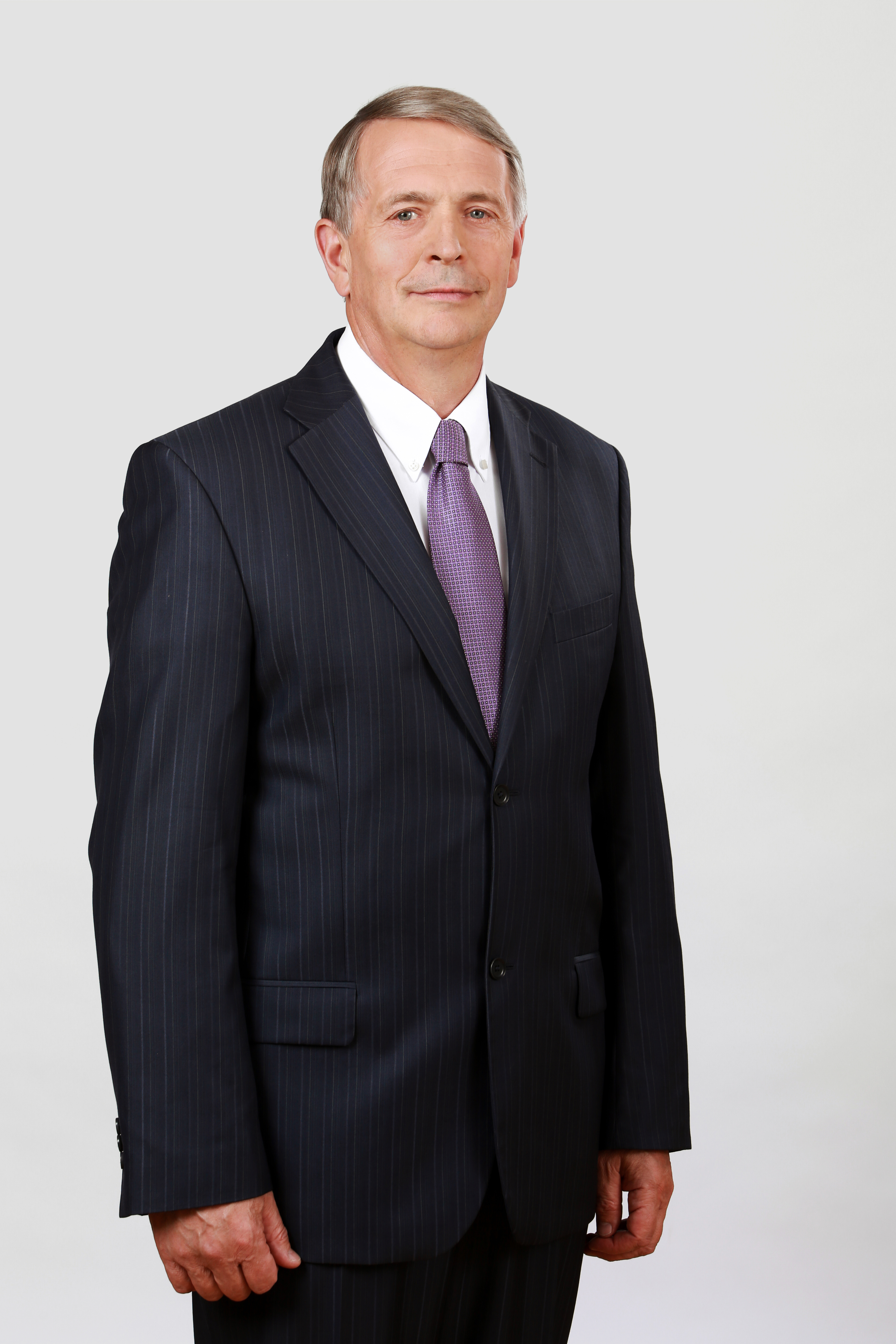 2014.gada 9.decembris. 12.Saeimas deputāts Inesis Boķis. Foto: Partijas Vienotība publicitātes foto